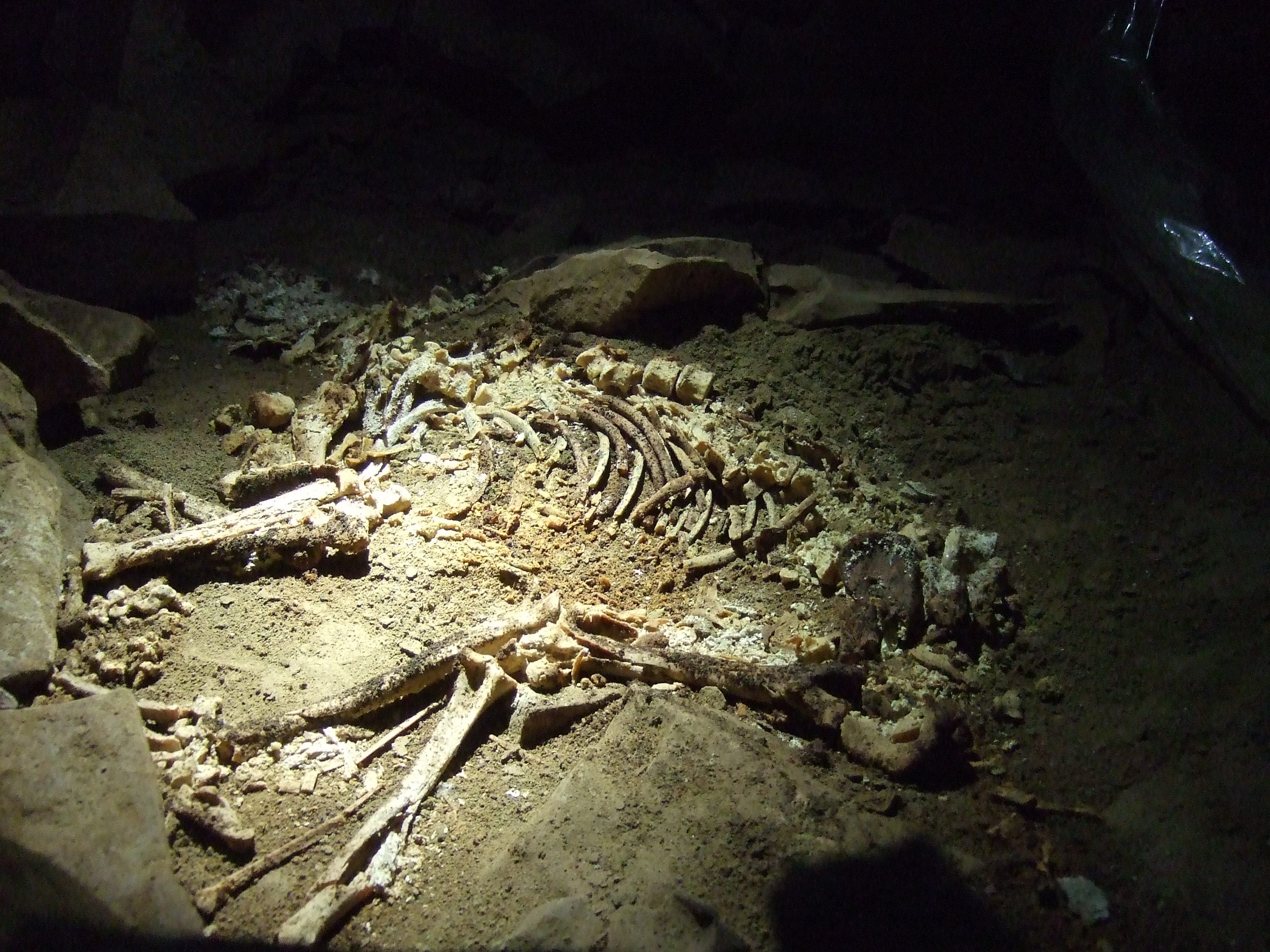 Fossil Dog Skeleton in Slaughter Stream Cave